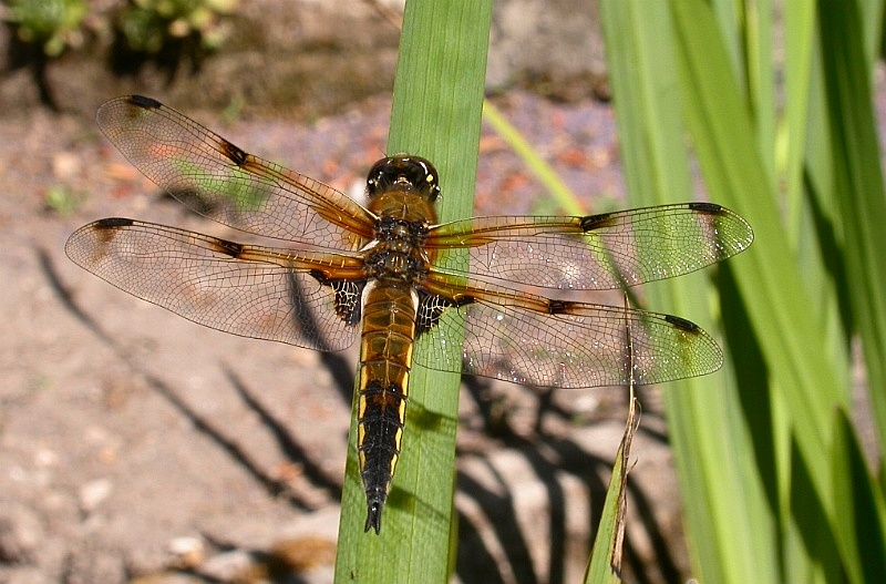 Libellula quadrimaculata - Gradignan, Gironde, France